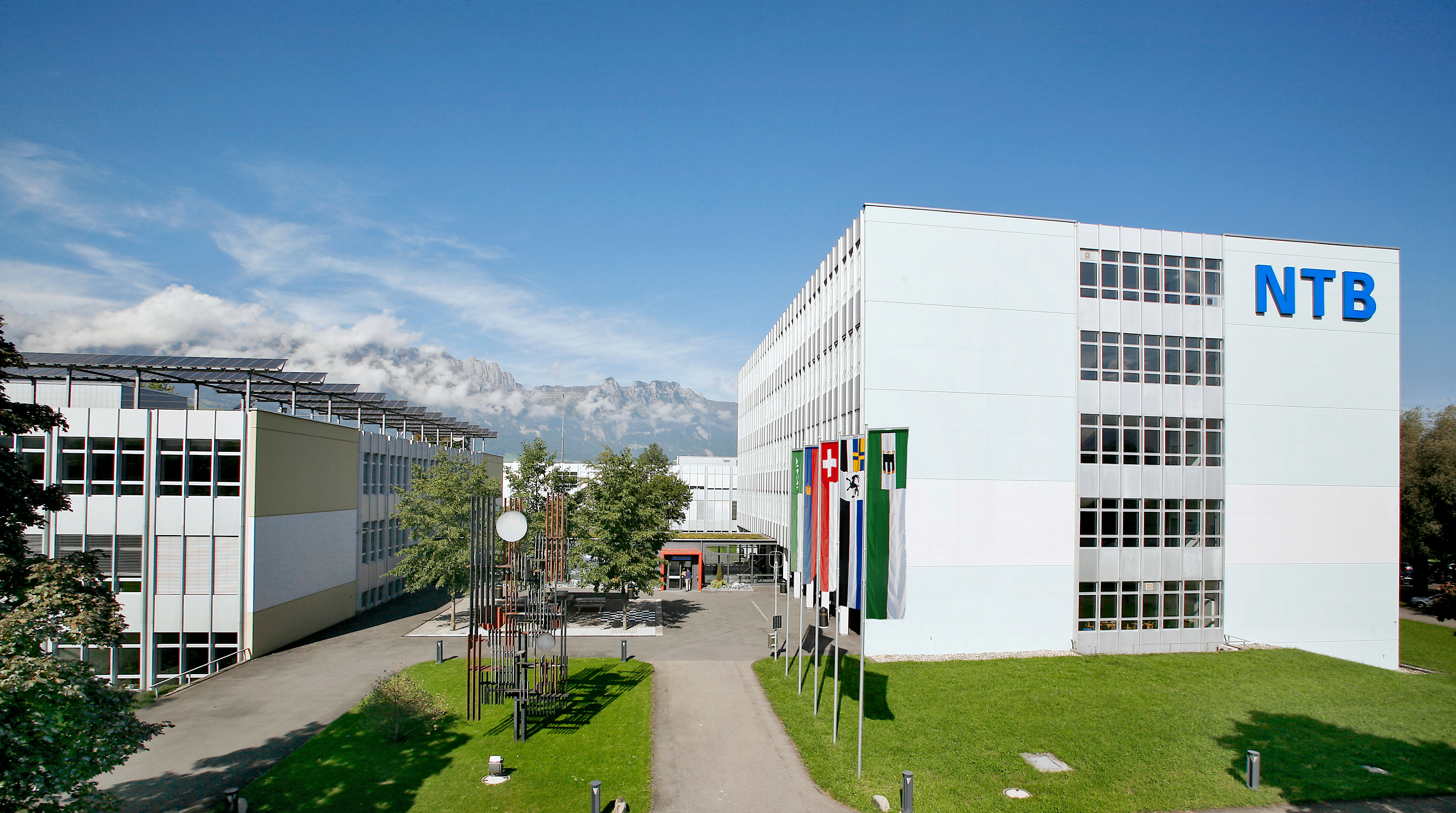 NTB Campus Buchs with flags